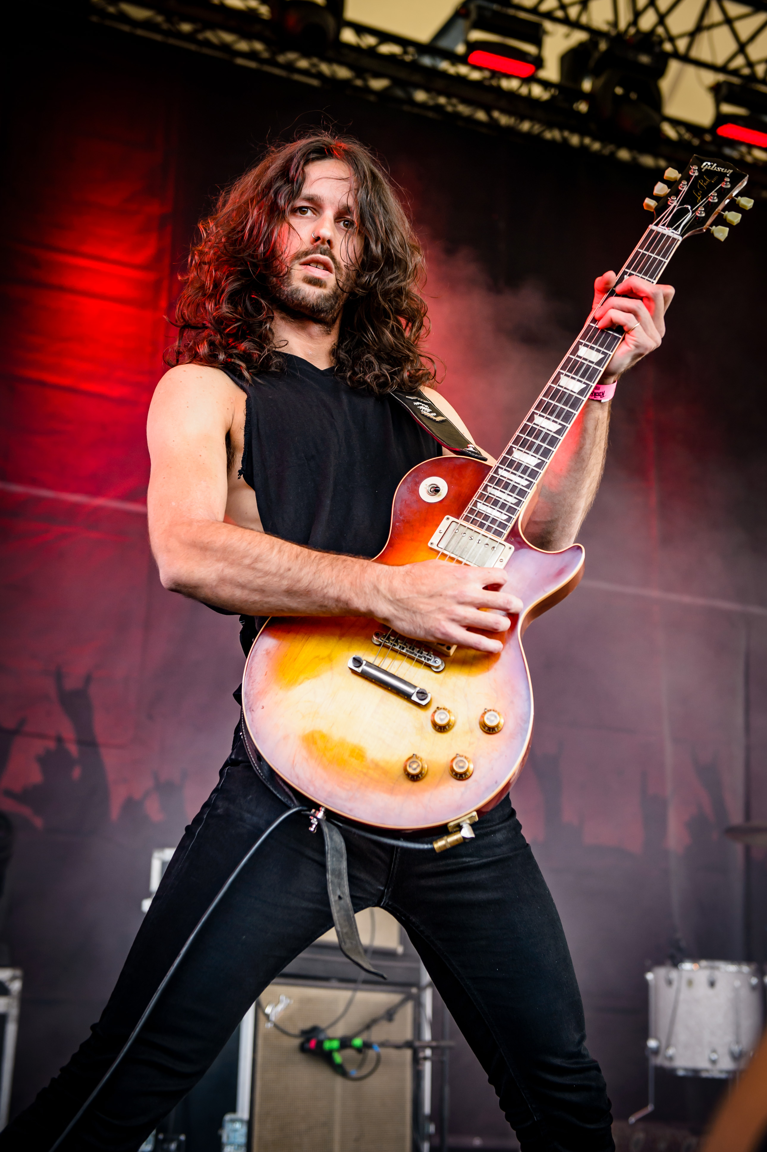 'Rock Hard Festival 2018; Amphitheater Gelsenkirchen': 'Dool'